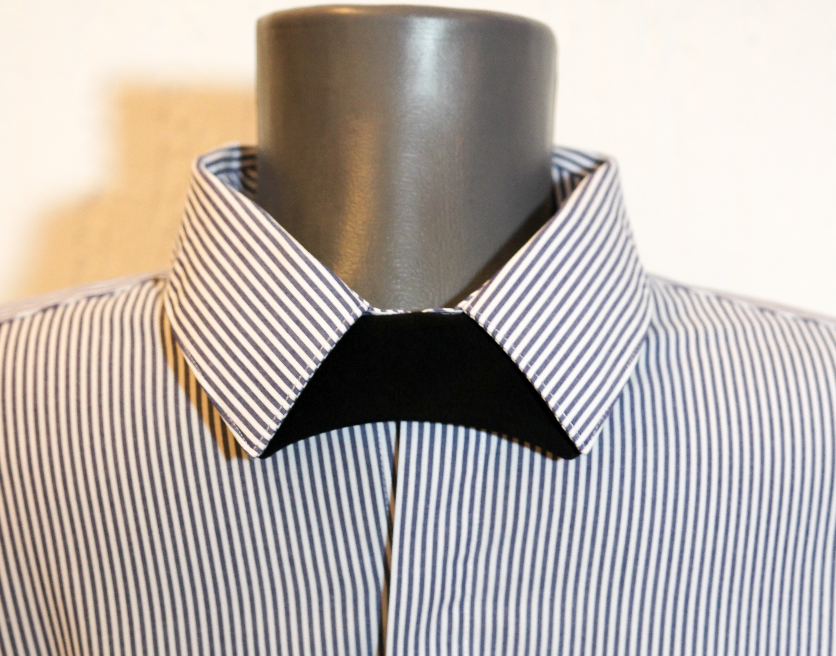 Фотографија на којој се може видети Ковилм.